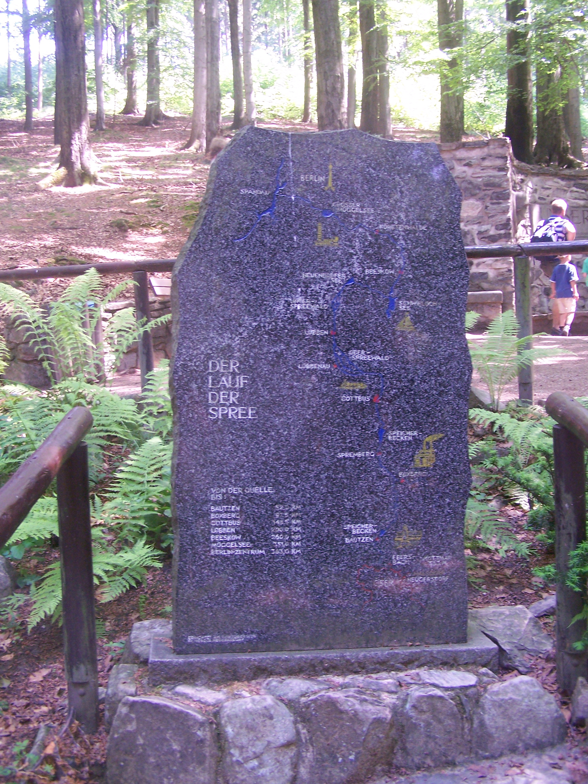 Granitplatte mit dem Verlauf der Spree an der Spreequelle auf dem Kottmar